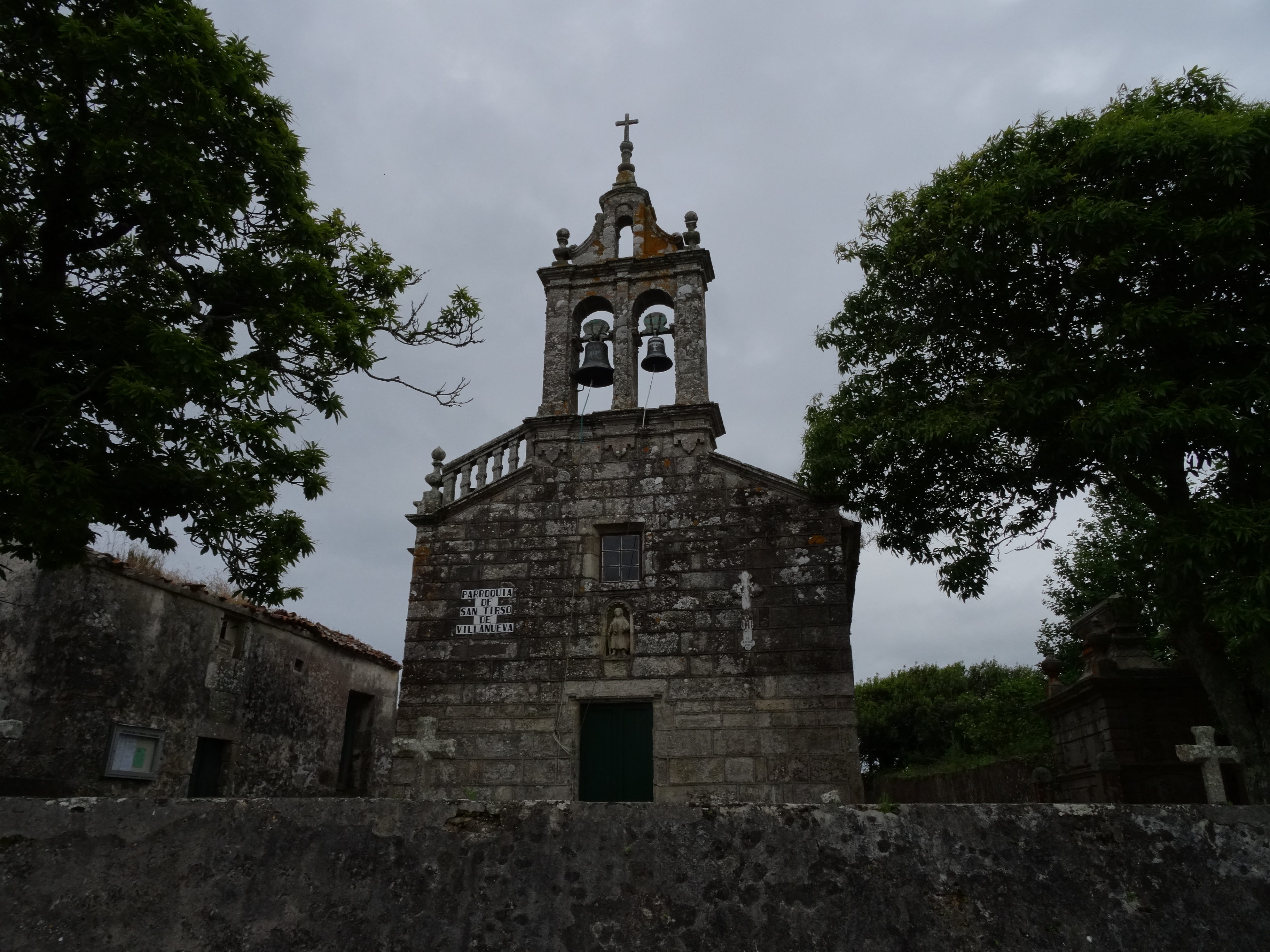 Igrexa parroquial de Vilanova de Santiso, Malpica de Bergantiños.